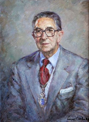 Портрет Рикардо Бесканса